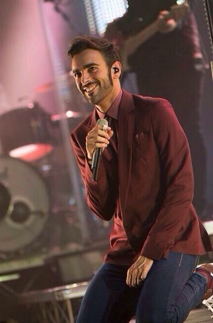 Le foto sul profilo di Marco Mengoni sono un po' vecchie, meglio aggiornarle